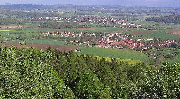 Blick vom Hesselberg auf Röckingen und Wassertrüdingen Fotograf: Oswald Engelhardt